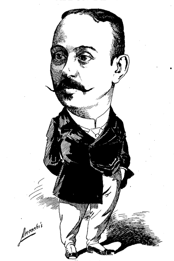 Caricatura de Abdón de Paz, publicada en la revista española Madrid Cómico.